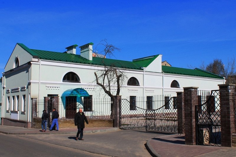 Пажарнае дэпо. Магілёў